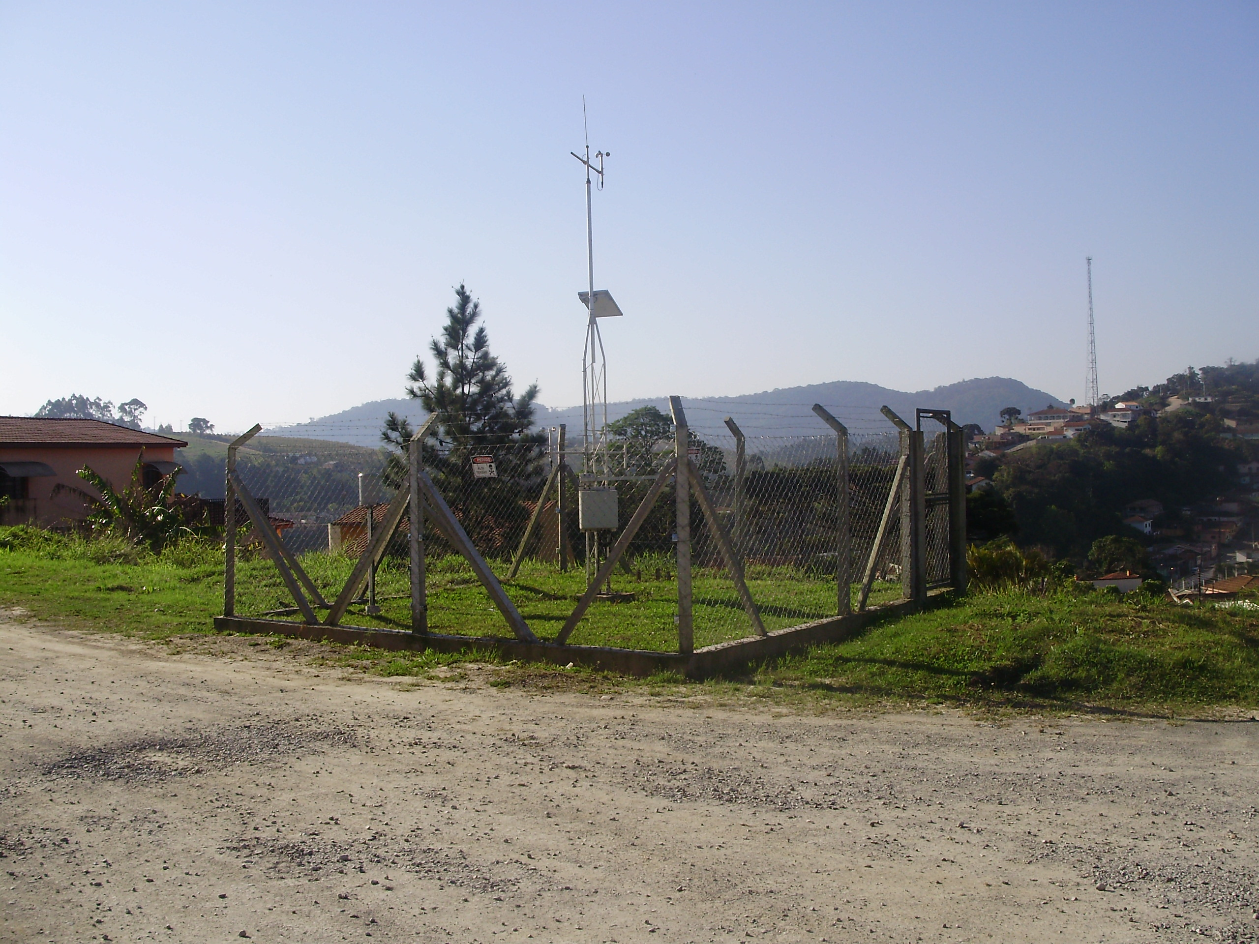 Estação Meteorológica